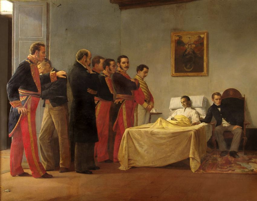 Muerte de Simón Bolívar, por Antonio Herrera Toro